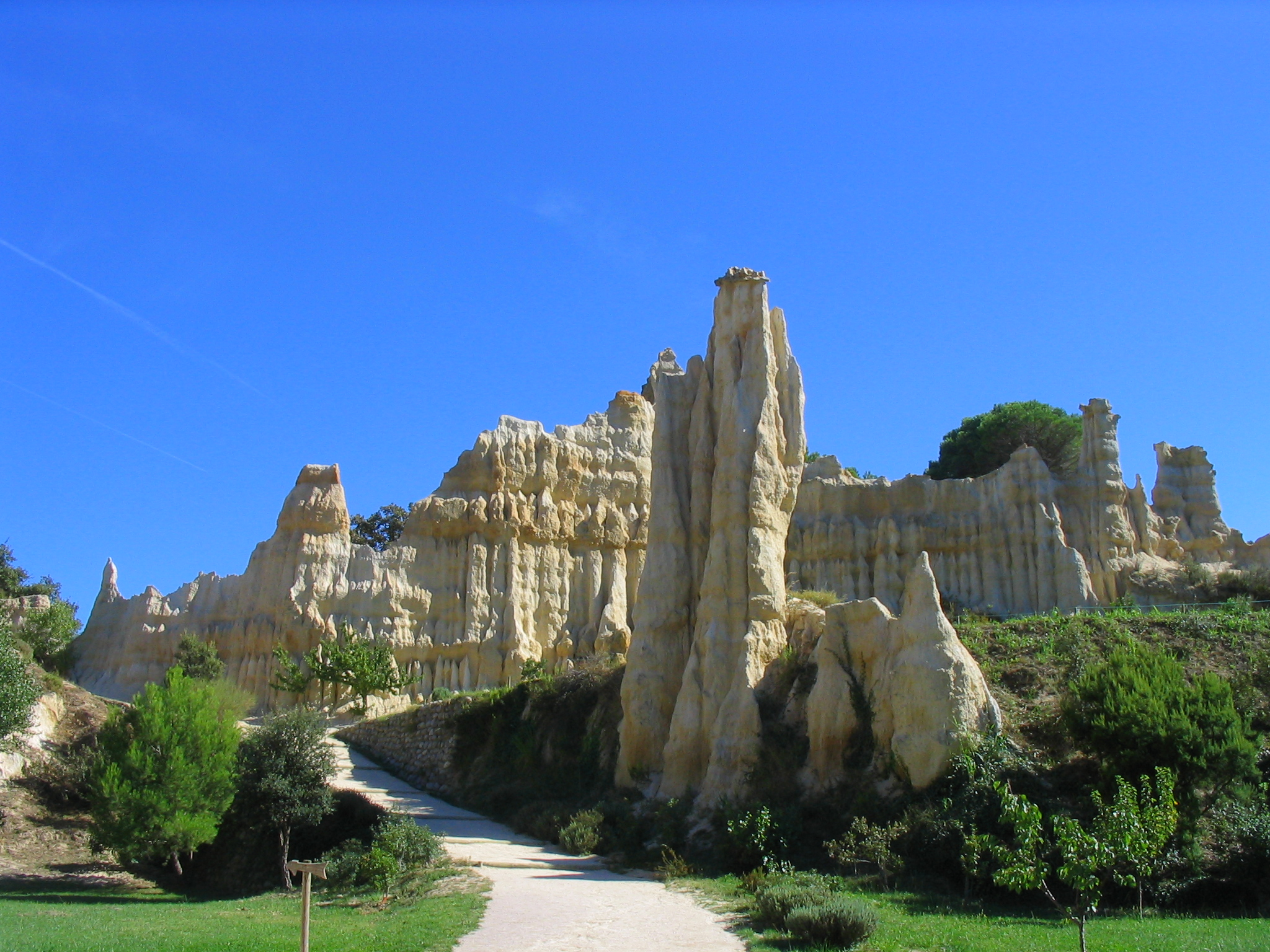 Les Orgues d'Ille-sur-Têt (Pyrénées-Orientales, France), une curiosité géologique.